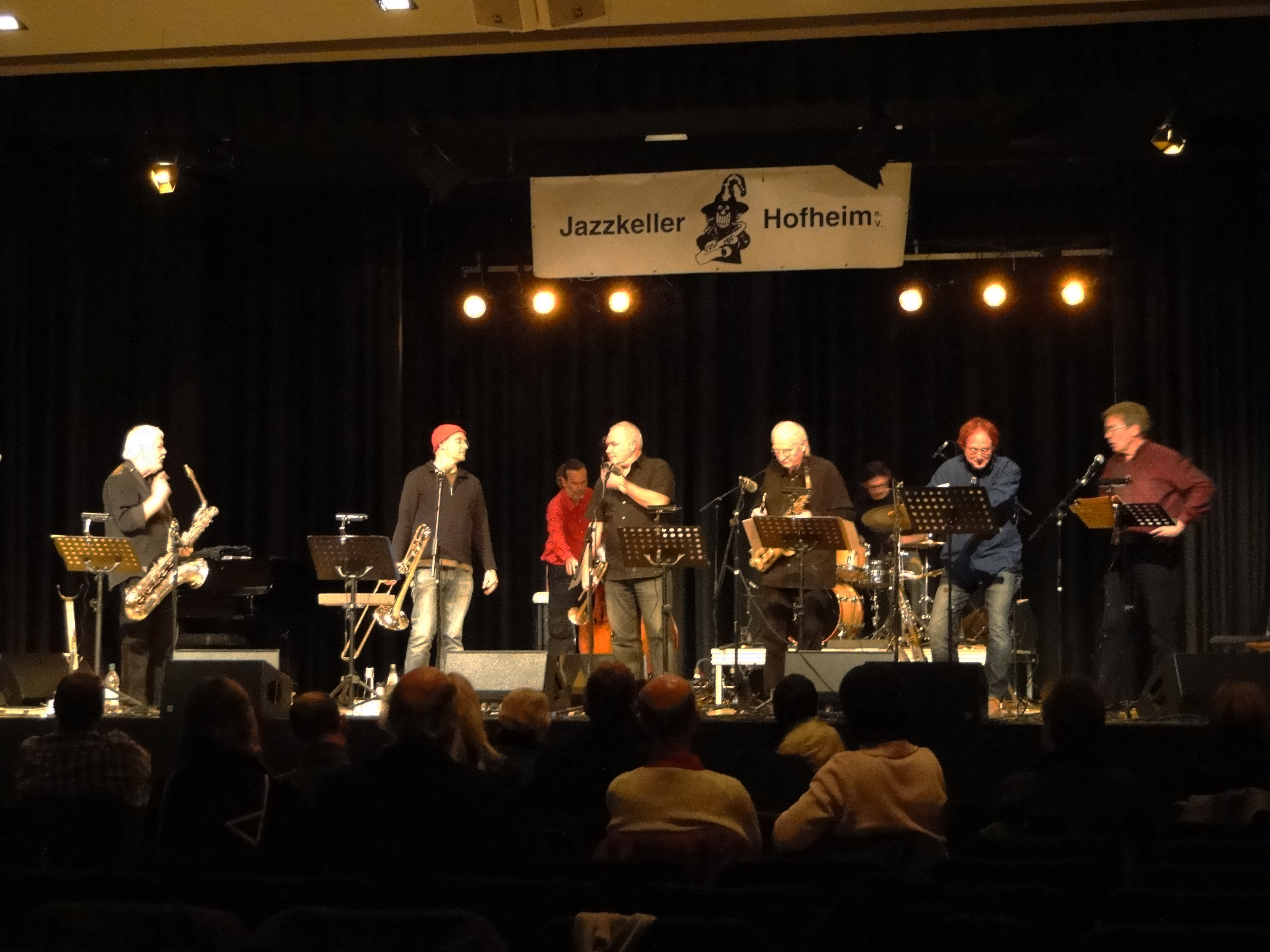 Das "Ekkehard-Jost-Oktett" und Dietmar Mues, auf dem Hofheimer Jazz Festival 2009.